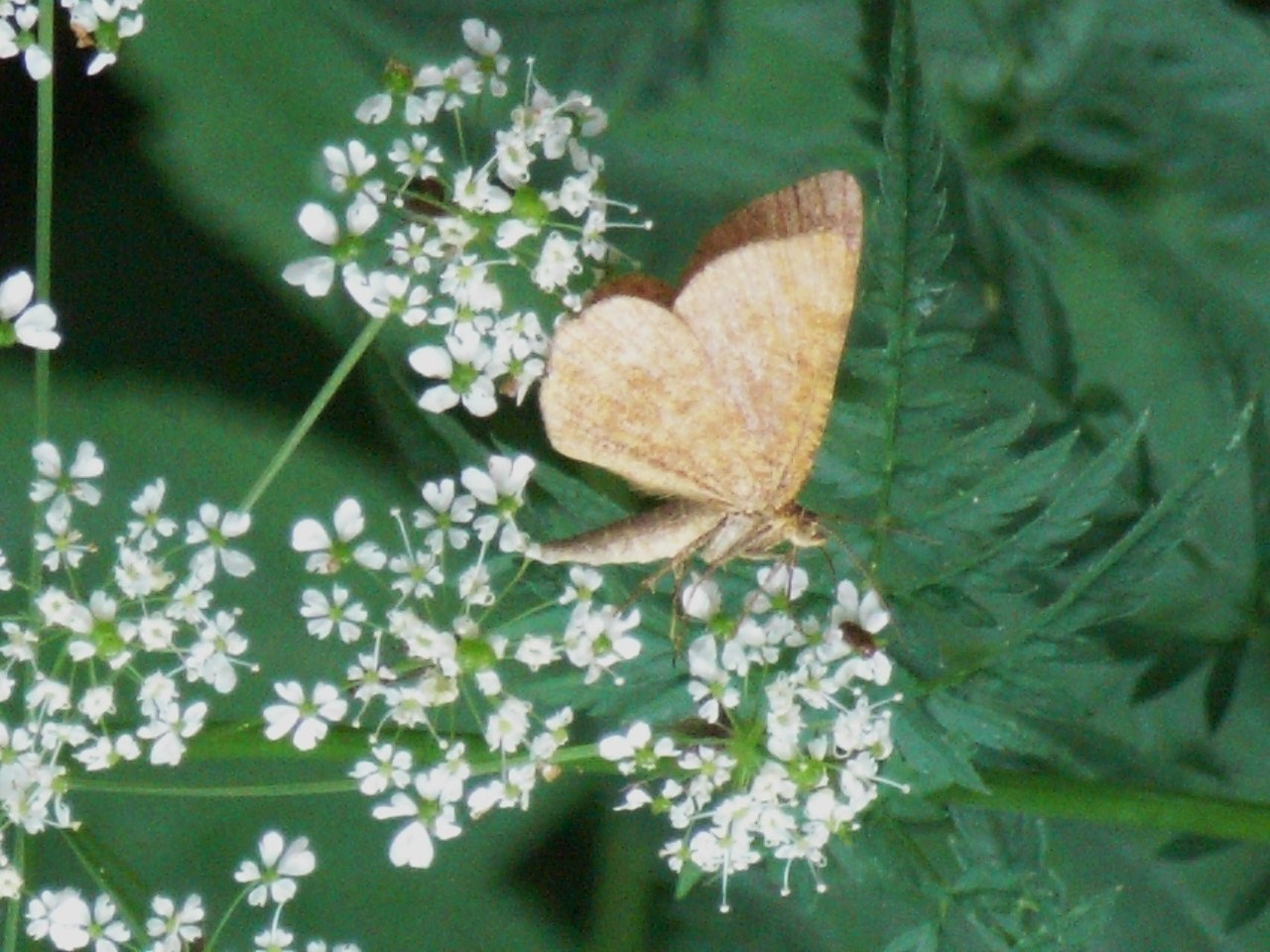 Waldmoorspanner (Macaria brunneata) bei Lindberg, Bayerischer Wald, auf Wiesenkerbel